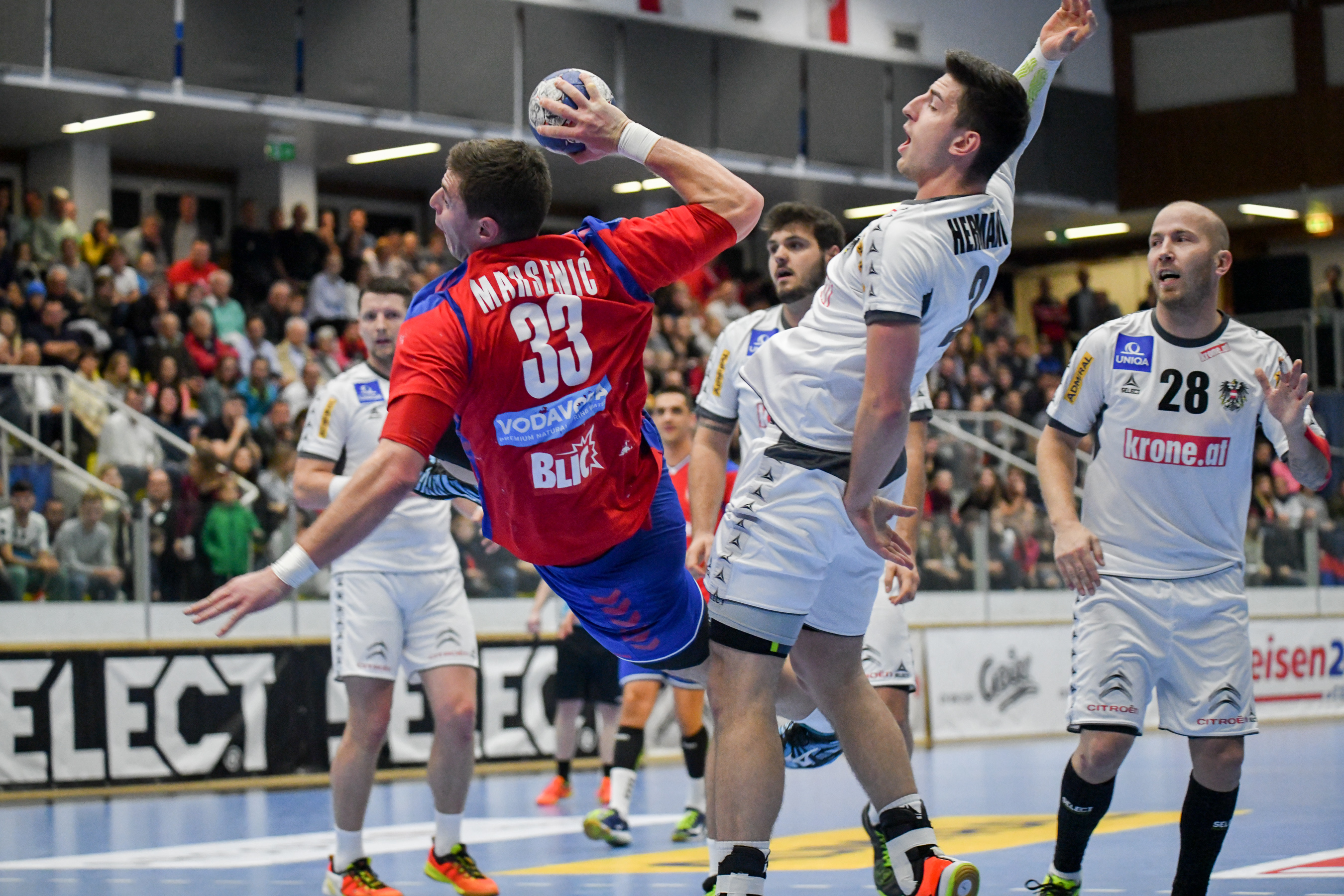 Freundschaftliches Handballspiel Österreich gegen Serbien am 28.10.2017 im BSFZ Südstadt. Bild zeigt: Mijajlo Marsenić beim Wurf